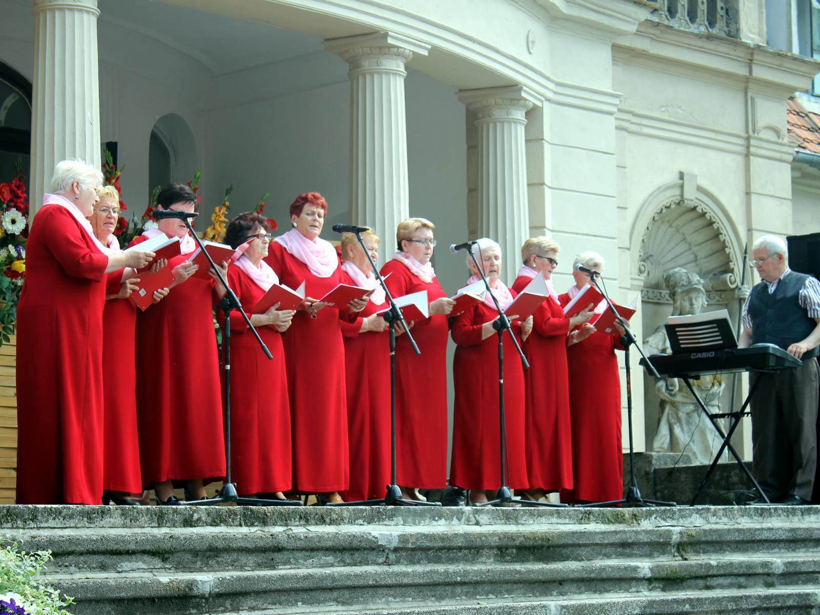 Wojcieszyce. Zespół wokalny "Echo"